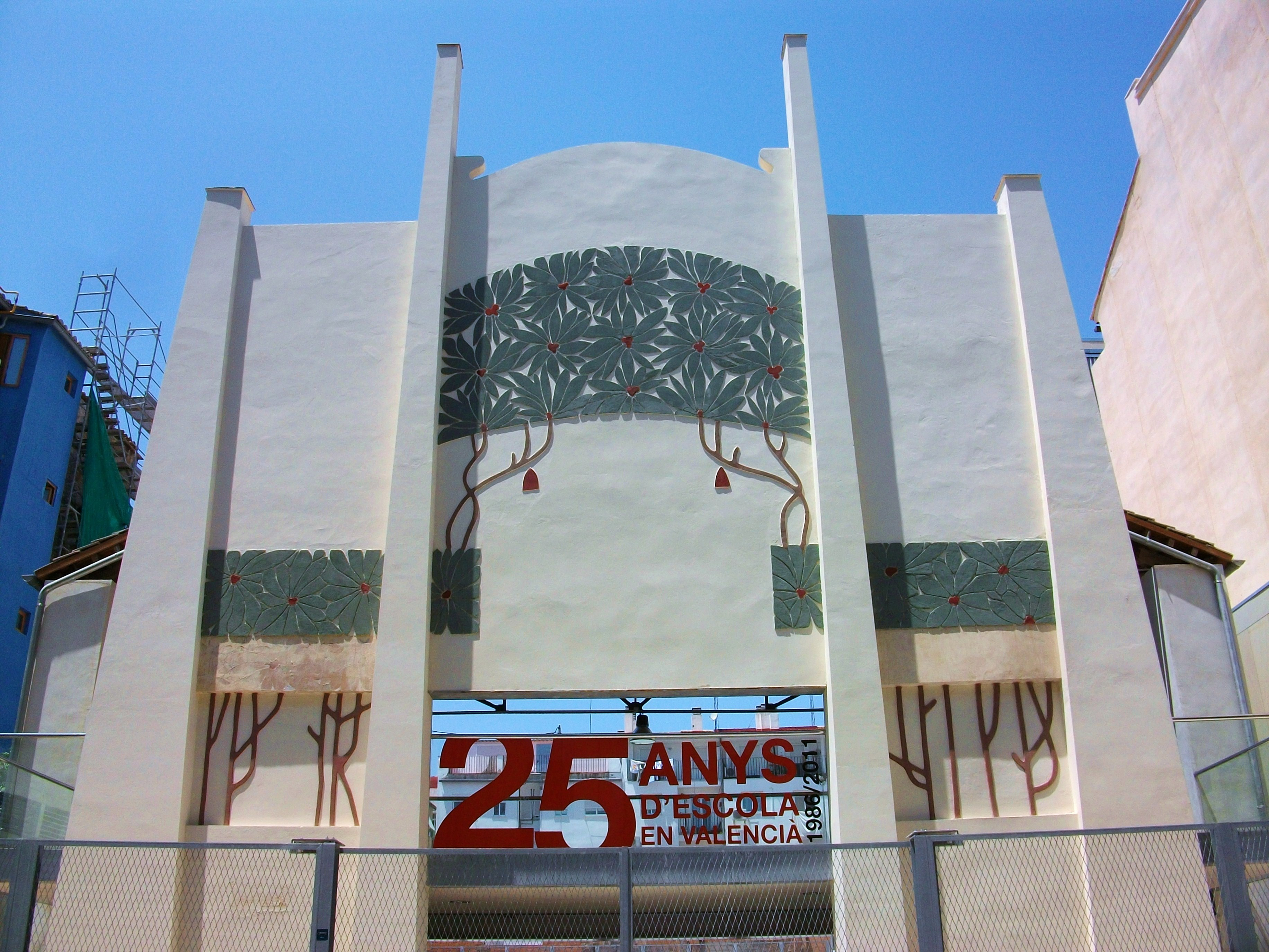 Façana dels antics cinemes Caro, al carrer Marqués de Caro 1, al barri del Carme de València. AEl seu arquitecte fou Vicent Ferrer Pérez, qui va projectar els cinemes el 1910, aquestos s'enderrocaren el 1995. De l'original conjunt modernista (inspirat en l'arquitectura vienesa i en els pavellons italians aixecats a Torí per a l'Exposició Internacional d'Art Decoratiu Modern de 1902), tan sols resta, la façana nau, que va ser utilitzada com a magatzem i que s'ha incorporat, després de la seua restauració, dins del complex de l'Escola Pública Santa Teresa.